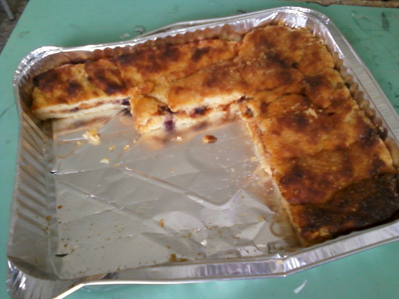 focaccia di patate assaggiata da poco alla 2d del costa, versione con pomodoro, cipolla, olive nere